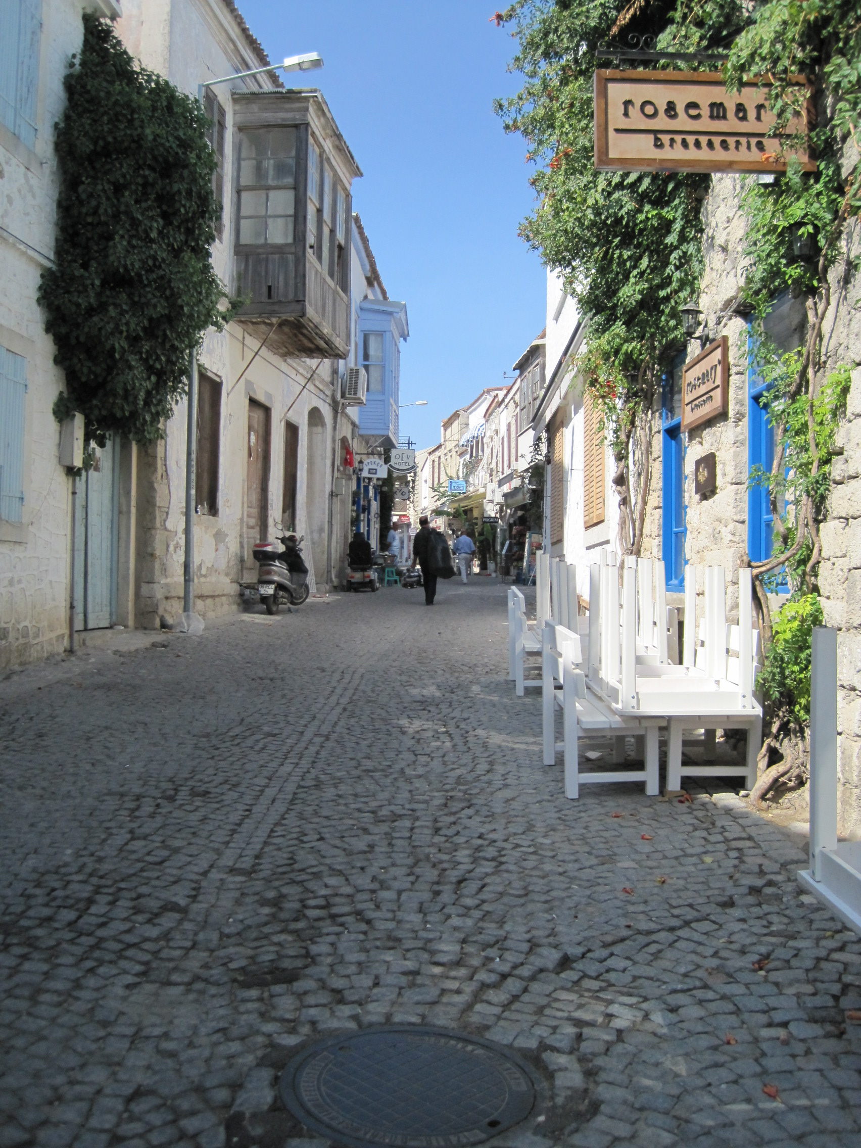 Yeni Mecidiye, 35930 Alaçatı/Çeşme/İzmir, Turkey